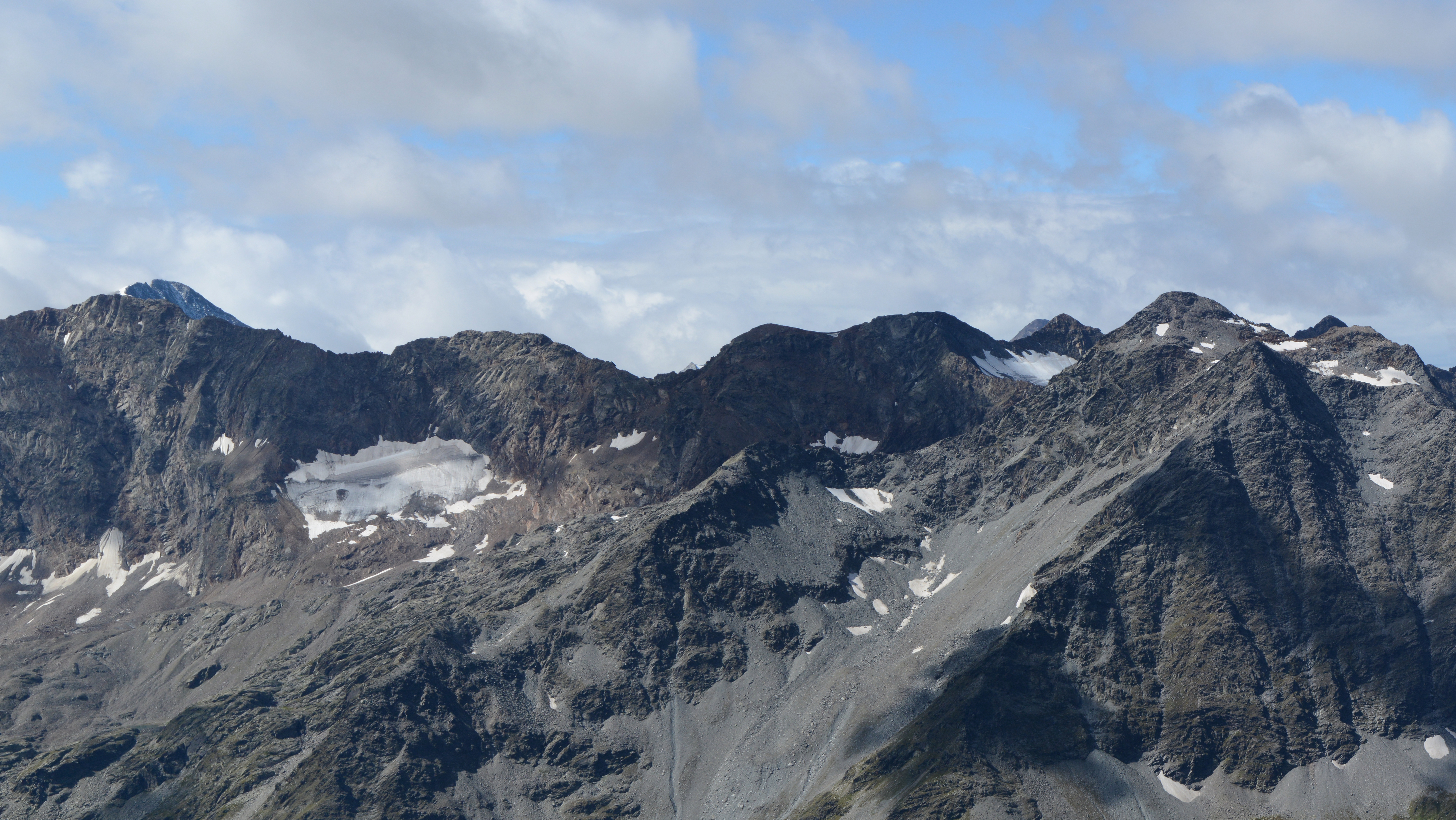 Blick vom Rotenmanntörl auf die Rieserfernergruppe